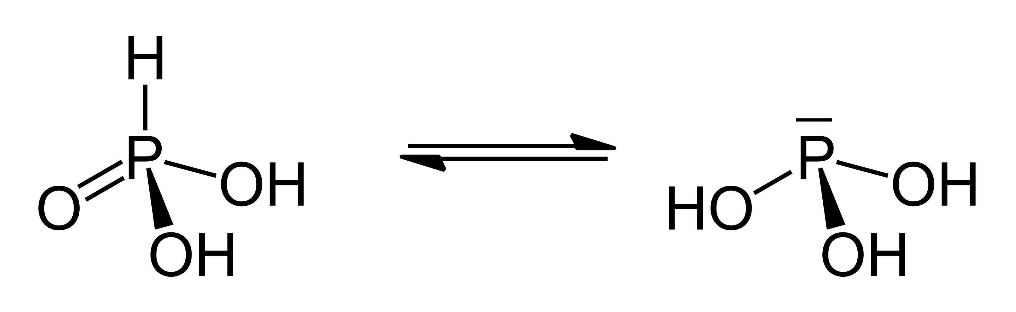 Zwei tautomerische Formen der Phosphonsäure